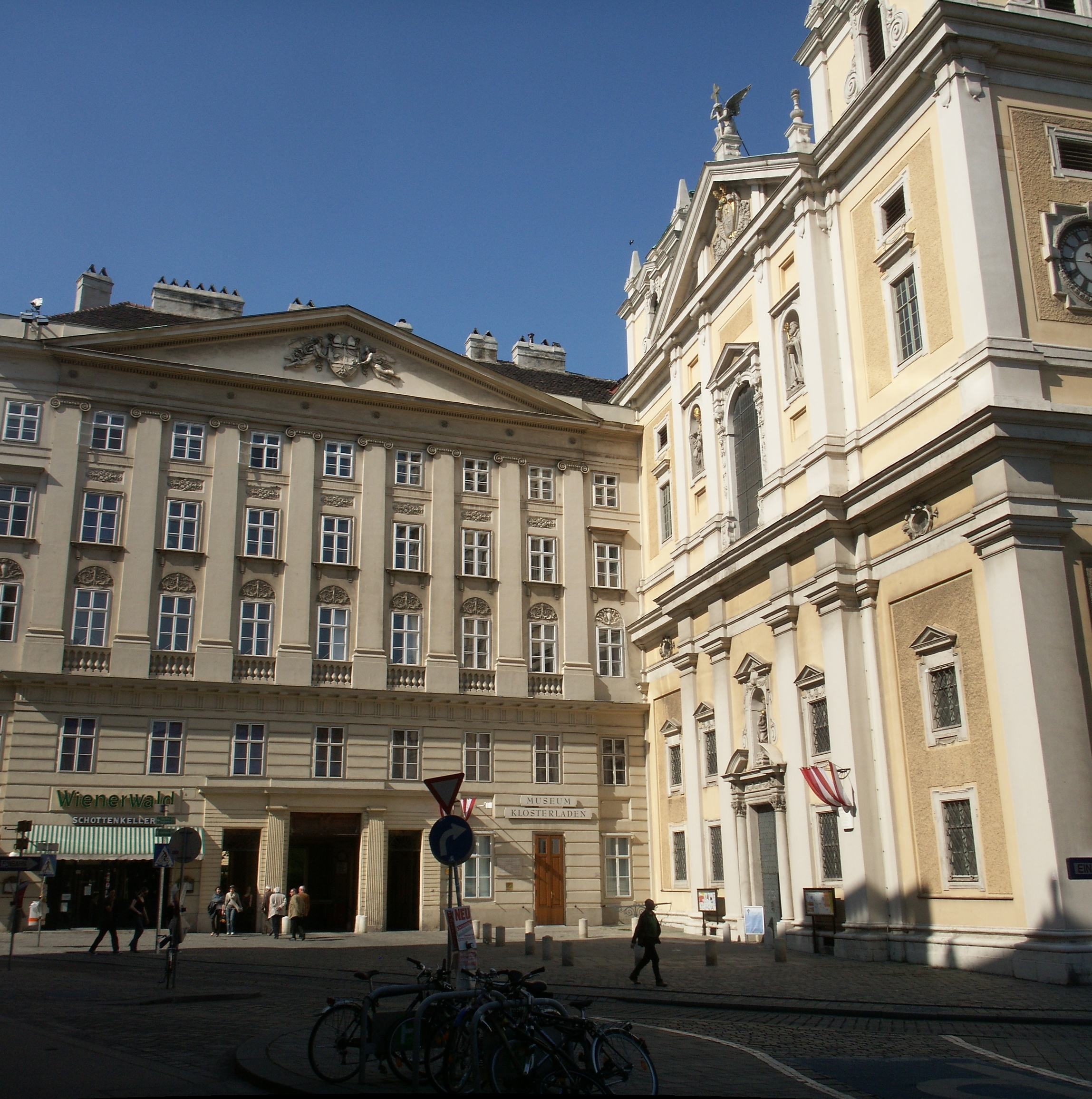 Schottenstift und Schottenkirche Wien (Panorama aus 2 Bildern)